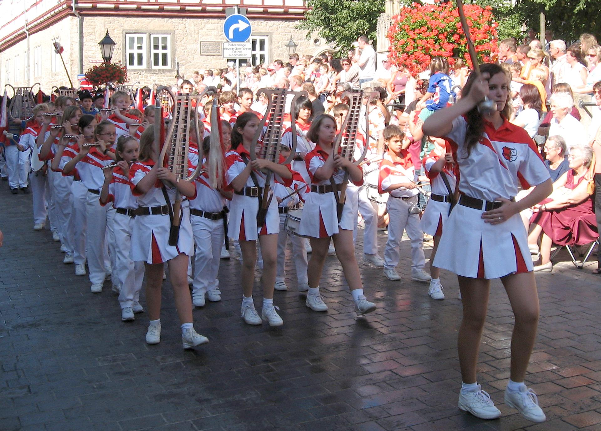 Mühlhäuser Spielmannszug beim Umzug am Kirmes-Sonntag 2008 (131. Mühlhäuser Stadtkirmes).